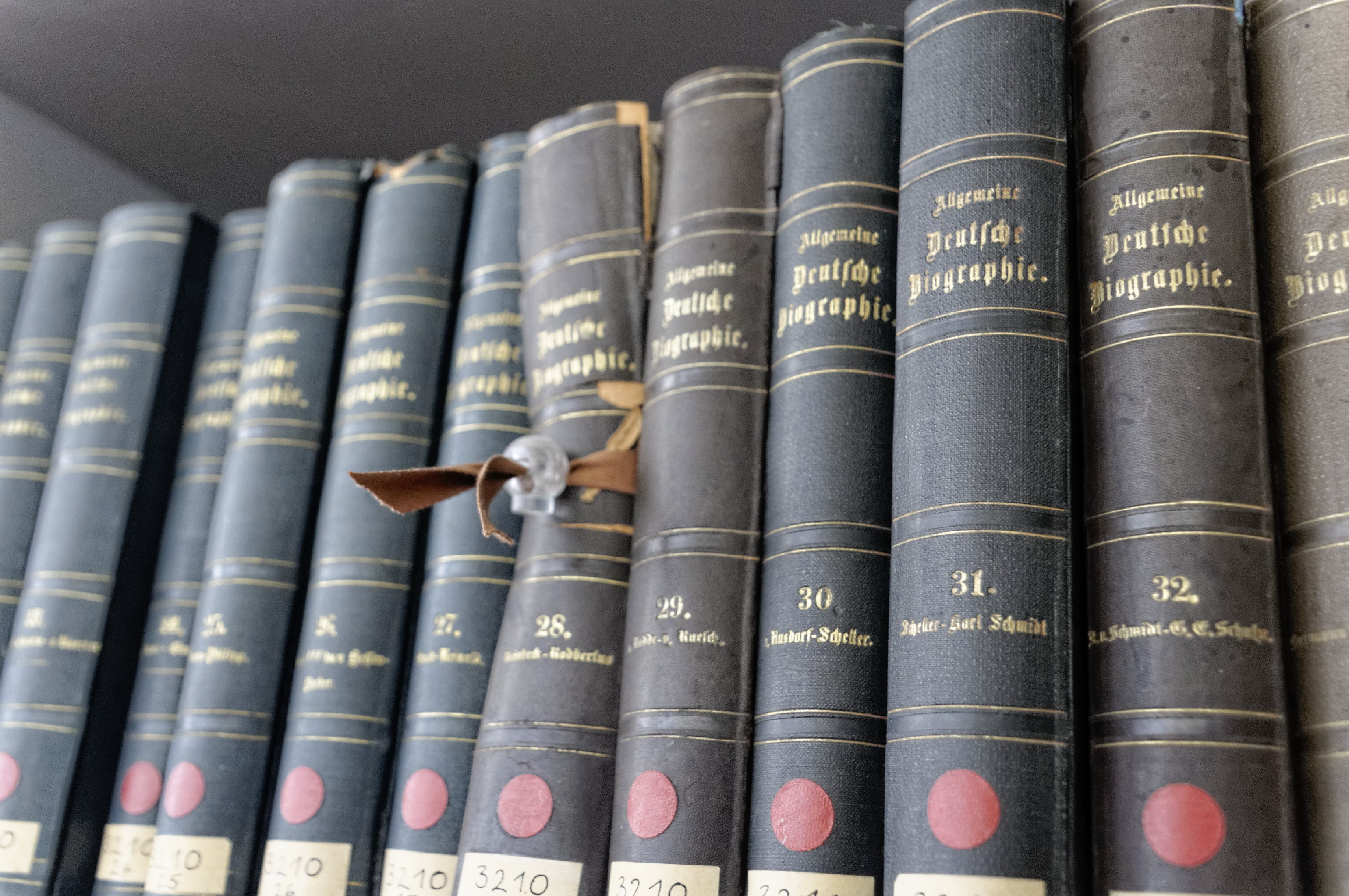 Bilder aus Schwerin 2017 Dieses Foto entstand durch die Unkostenübernahme der Wikimedia Deutschland e. V. Wikimedia Deutschland e. V. hilft den Freiwilligen der Wikipedia bei der Erstellung von freien Inhalten. Dieses Foto entstand durch die Technik von der Wikimedia Österreich e. V. Wikimedia Österreich e. V. hilft den Freiwilligen der Wikipedia bei der Erstellung von freien Inhalten.